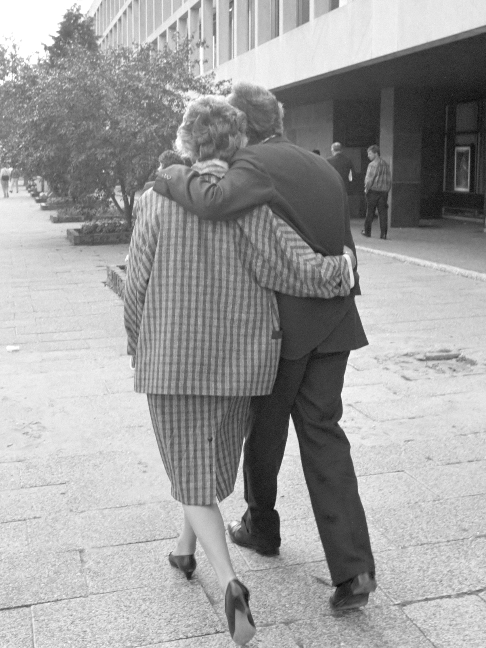 CDA-partijraad in Rotterdam; na afloop loopt premier Lubbers met zijn echtgenote naar de auto (op rug gezien) 4 juni 1988